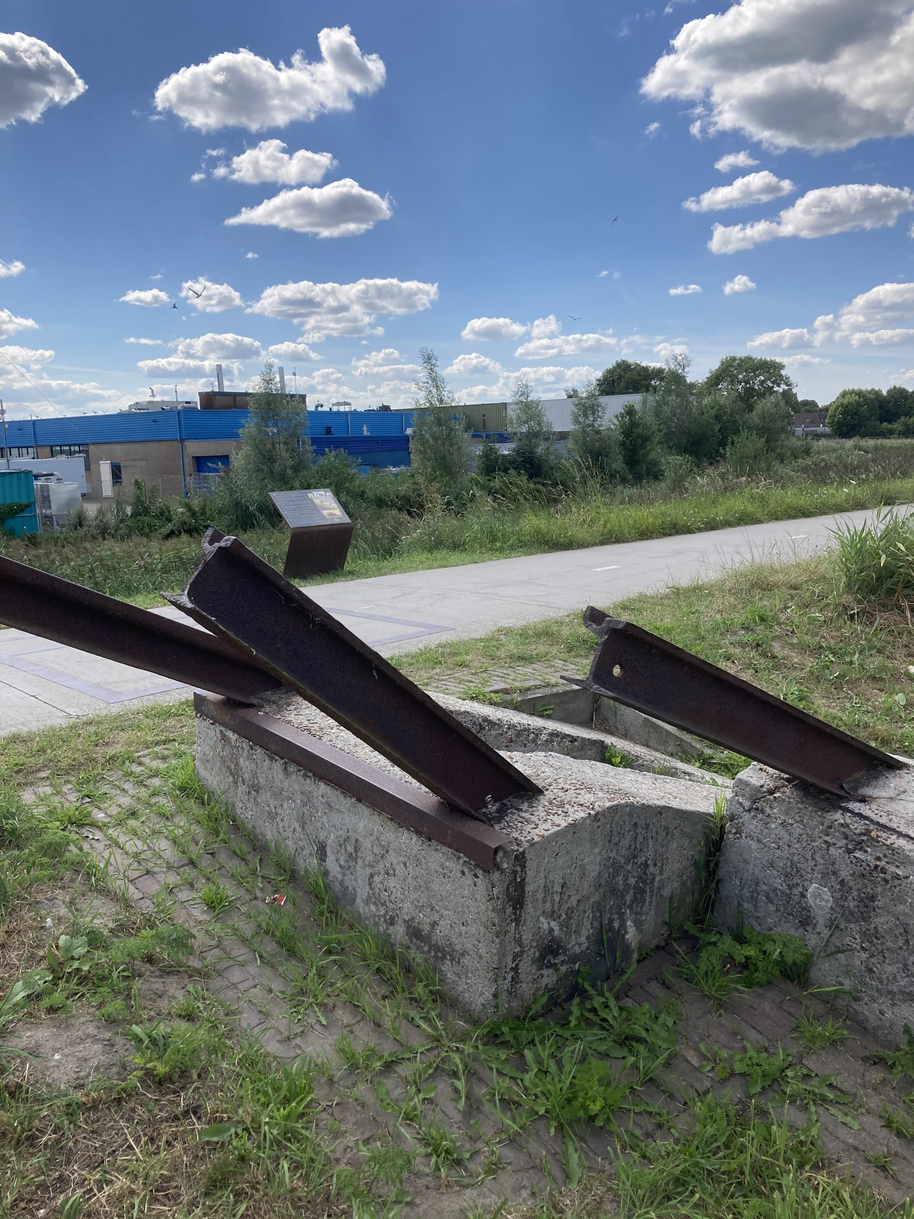 tankversperring bij Spakenburg uit de mobilisatietijd